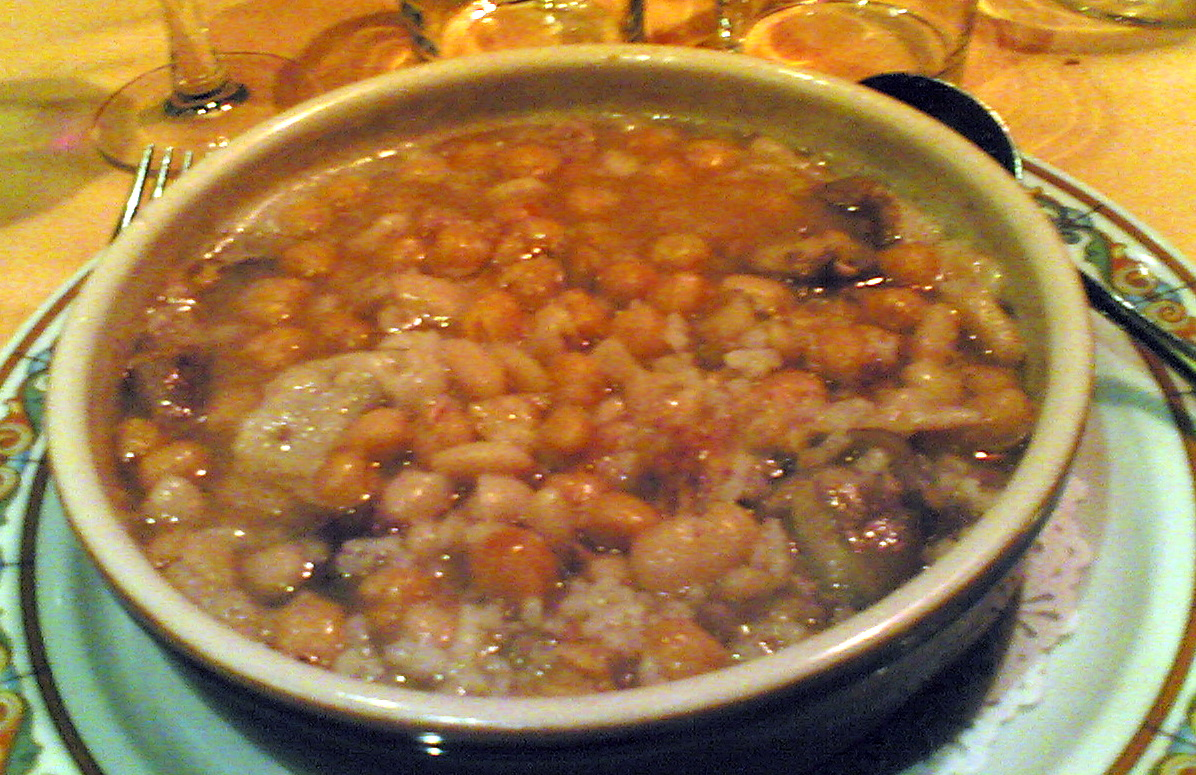 Plato típico de Granada, de la época de San Antón. Puchero con muchas cosas, contundente, con morcilla y chorizo. Éste, en concreto, en La Pataleta.